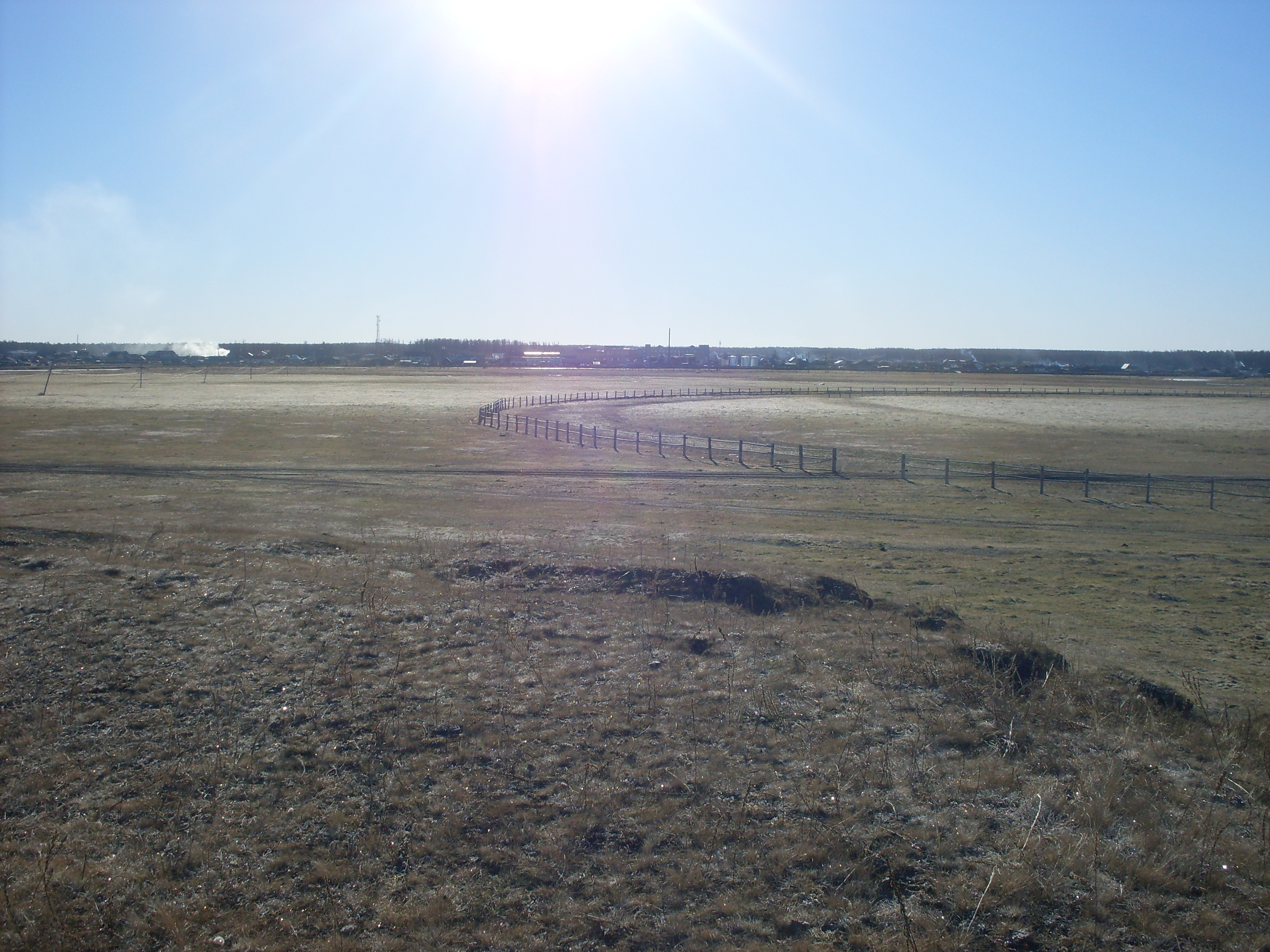 с. Дябыла.